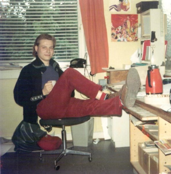 Uno i 68 på Interpresse!